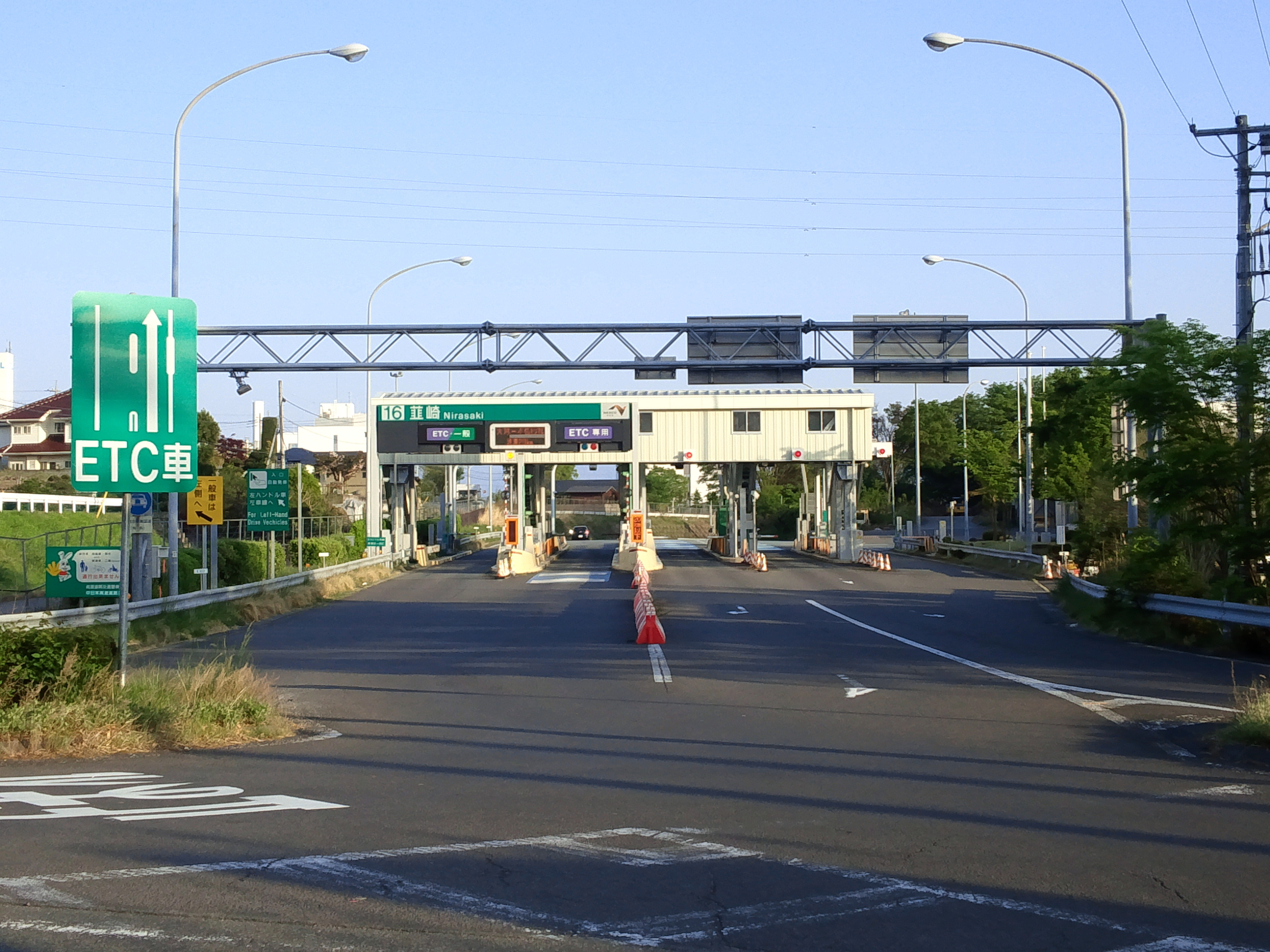 中央自動車道韮崎インターチェンジ料金所